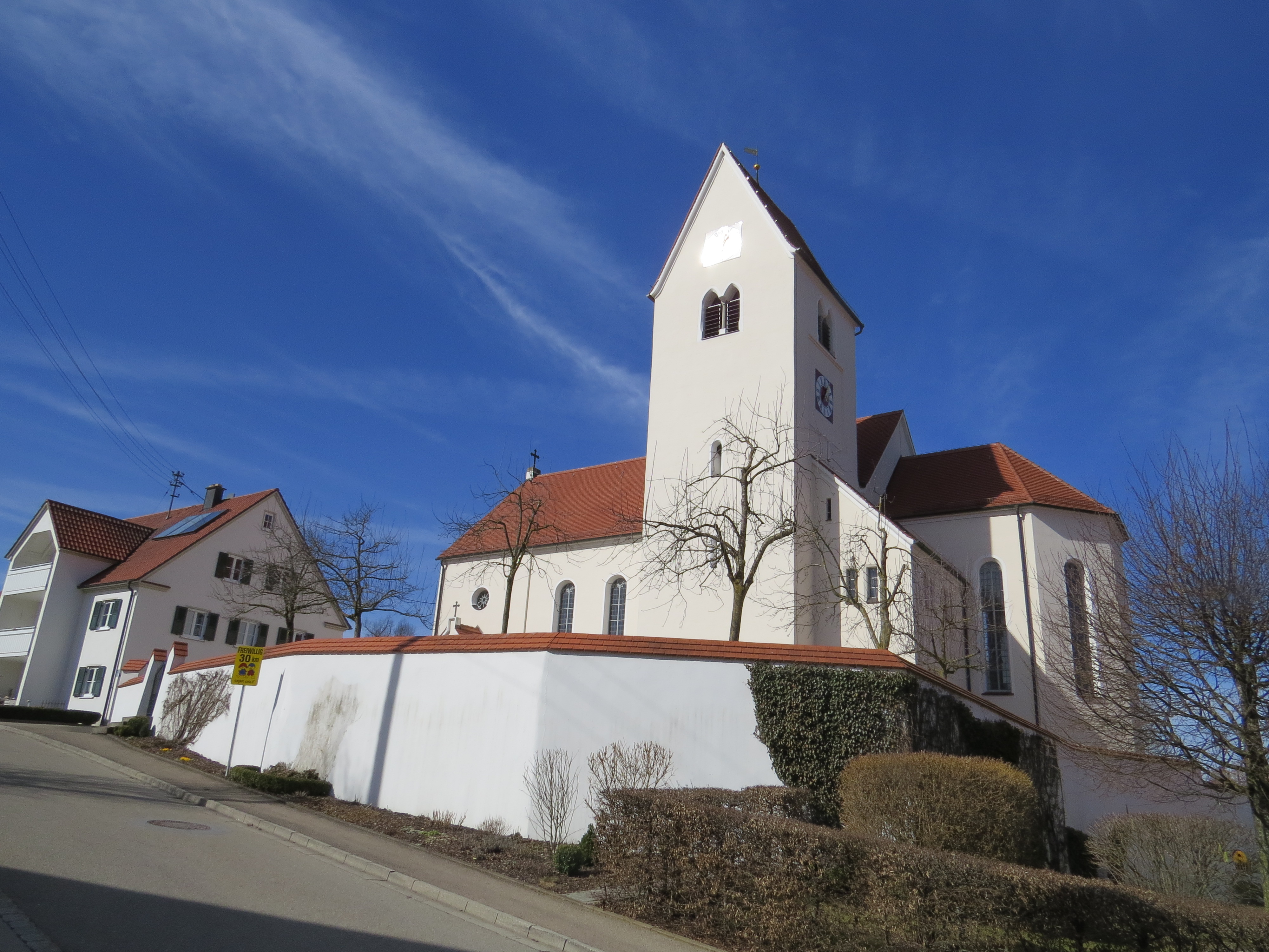 Kirche in Waltenhausen